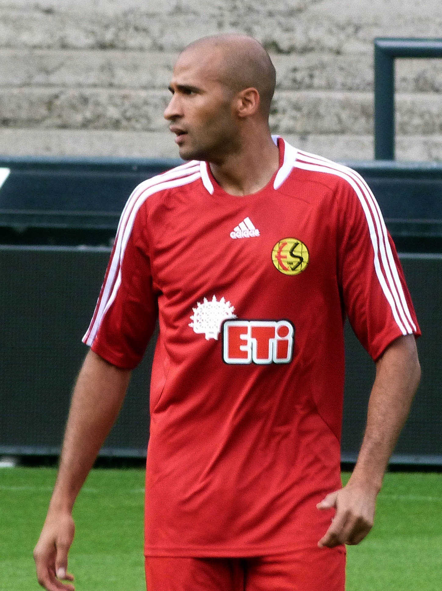 Kamara